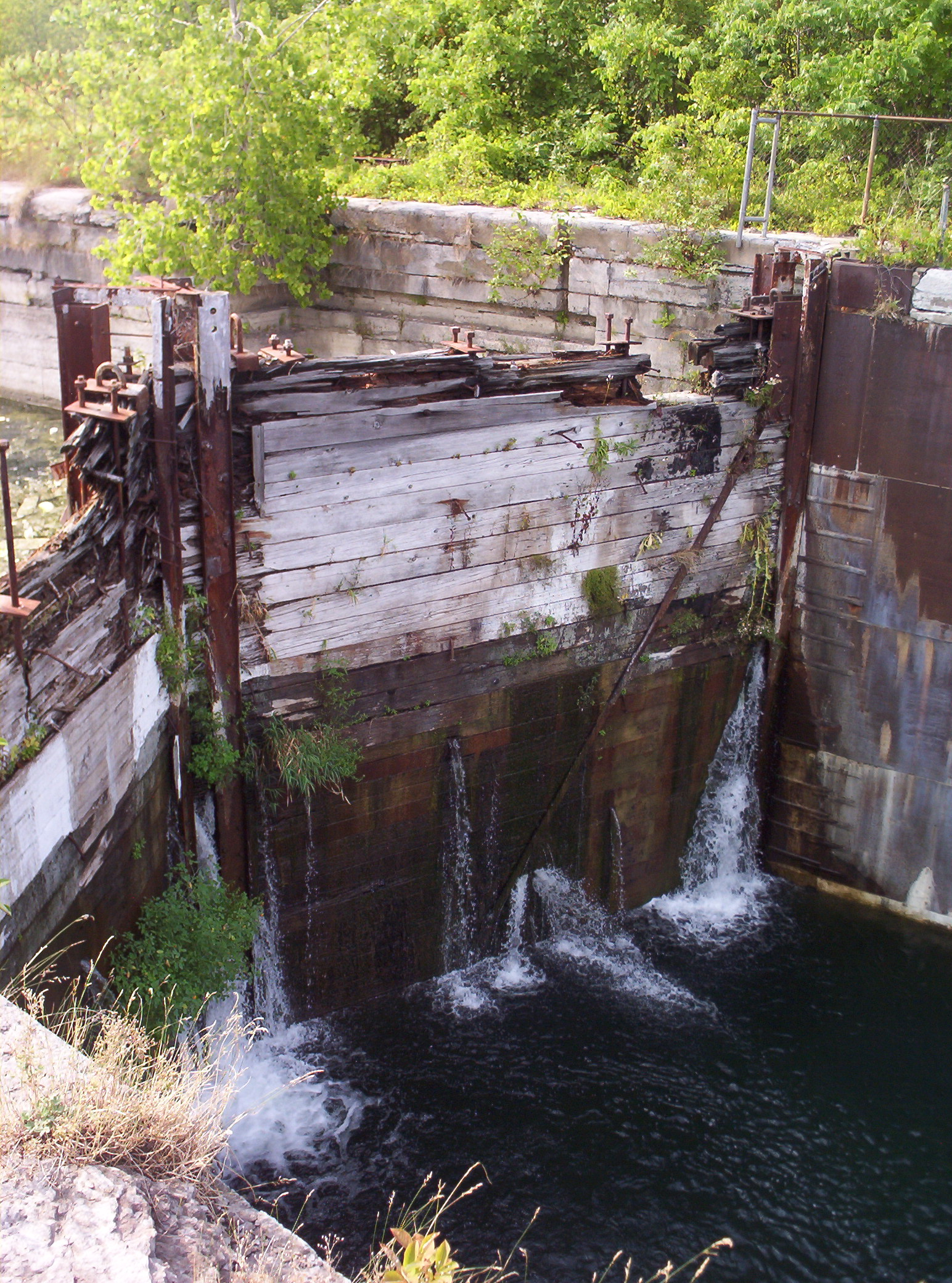 Écluse du canal Soulanges, au Québec